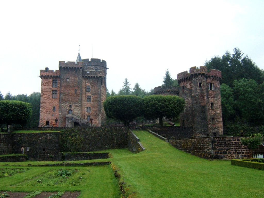 Château Dauphin (France), façade